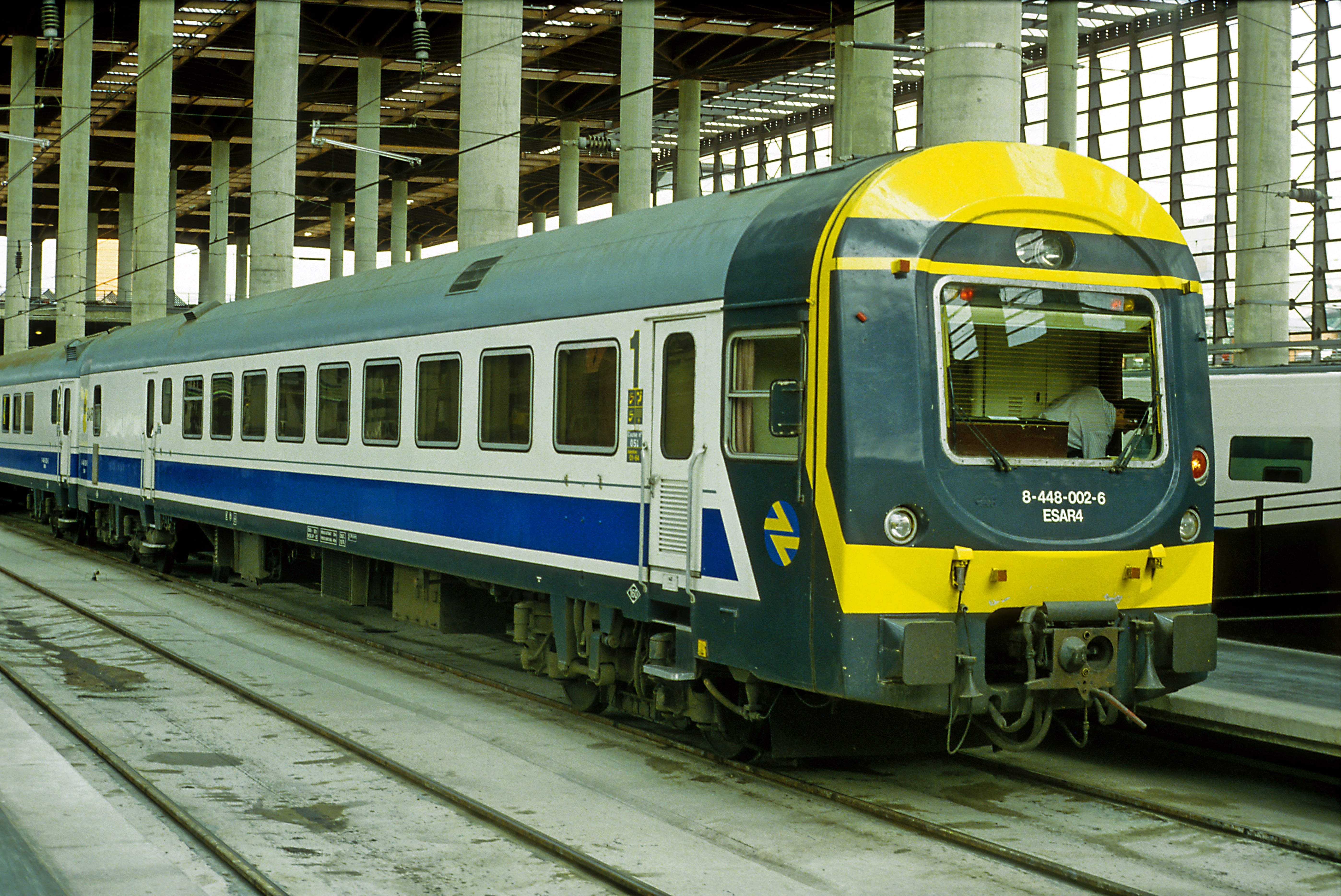 Steuerwagen eines Fernbahn-Triebwagenzuges (»electrotrén«) auf Breitspur. Bis zur Einführung der Schnellfahrstrecke nach Barcelona waren die Gleise in der westlichen Hälfte der Kopfbahnsteighalle breitspurig.